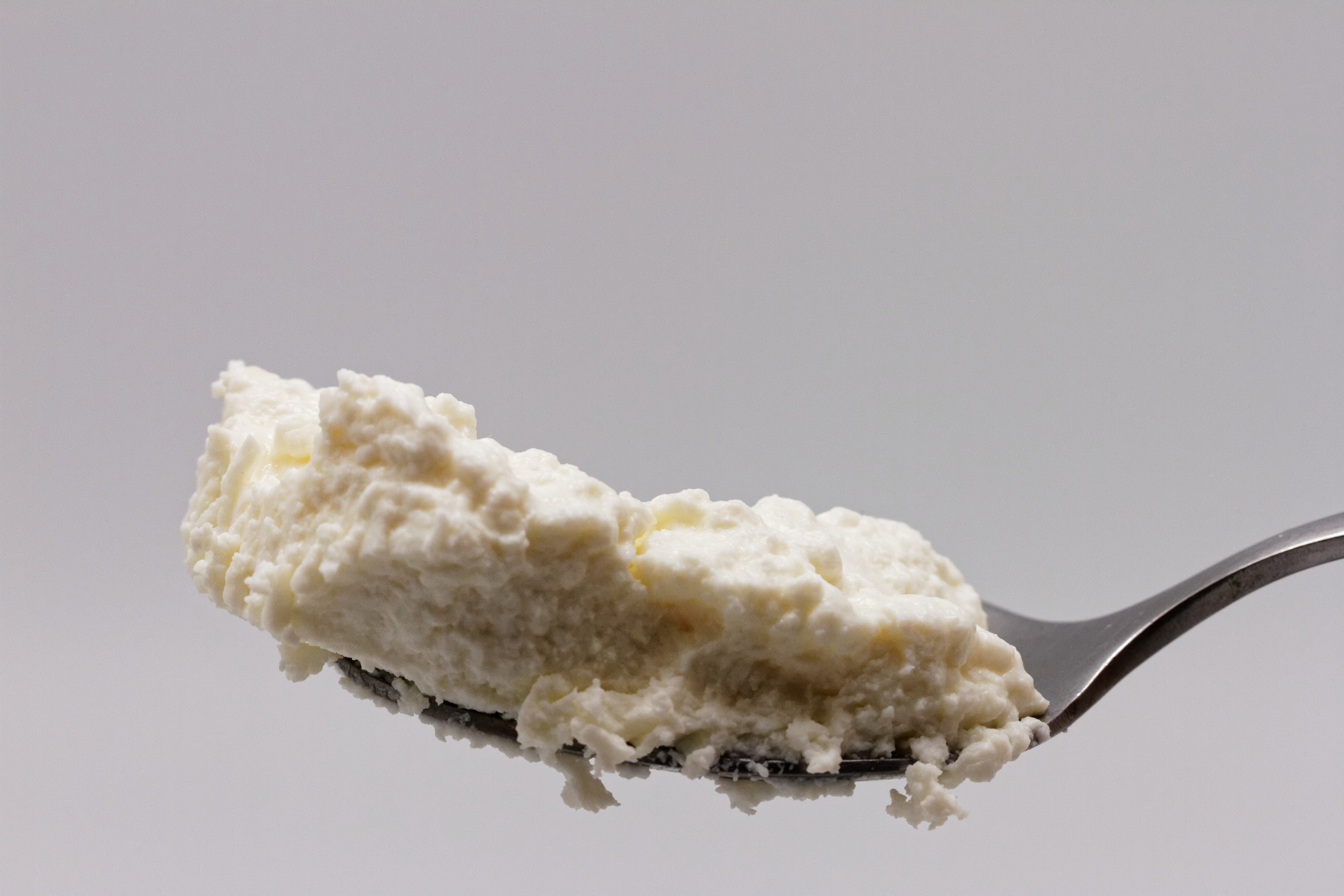 Du Brocciu frais, fromage corse.